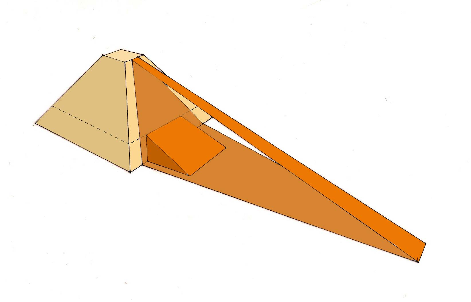 Rampe frontale préconisée par Ludwig Borchardt pour l'édification d'une pyramide